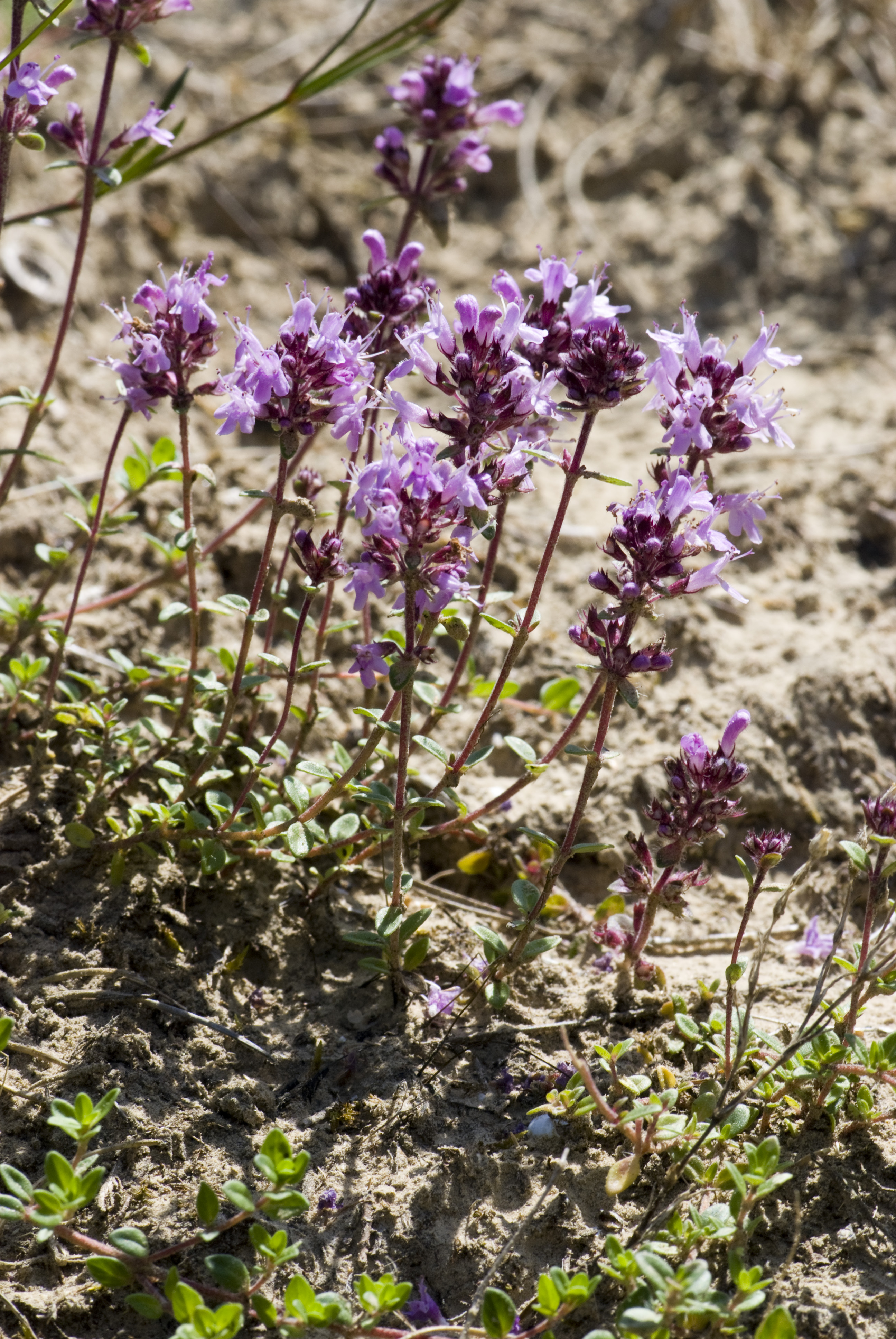 Thymus praecox Bethisy-saint-Martin (Oise), France